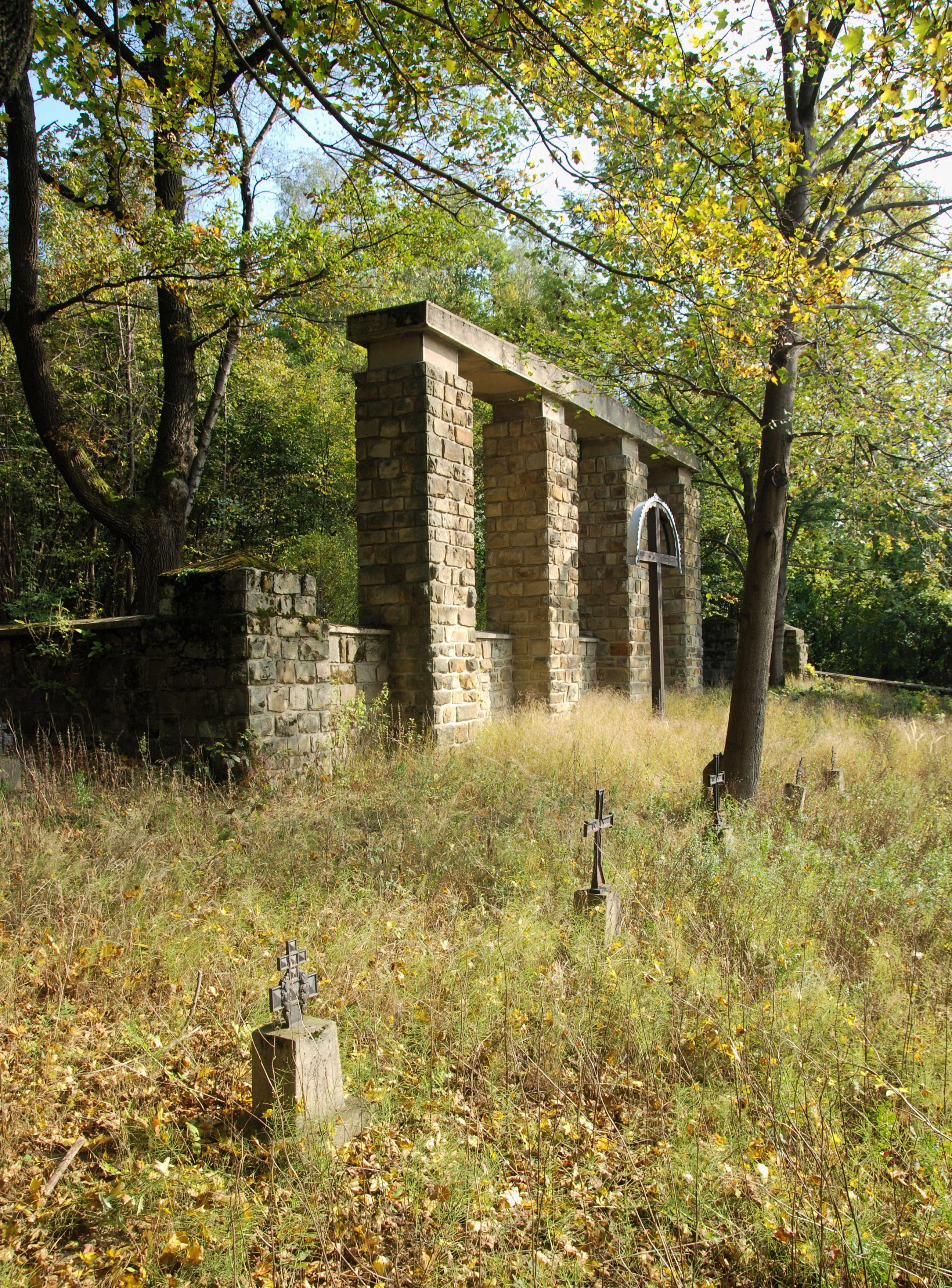 cm. wojenny